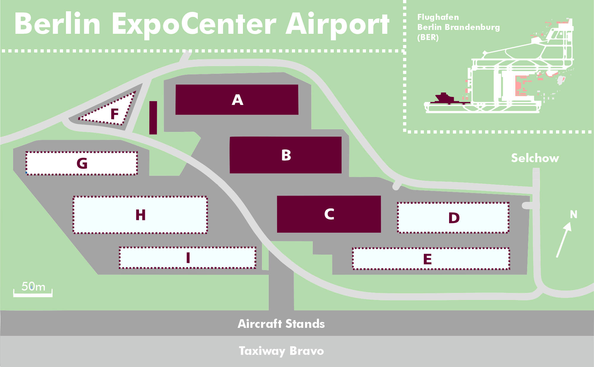 Übersicht über die Berlin ExpoCenter Airport